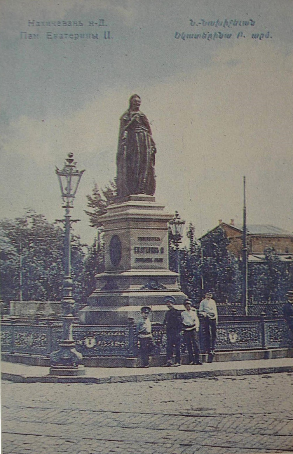 Памятник Екатерине II в Нахичевани-на-Дону на дореволюционной открытке.